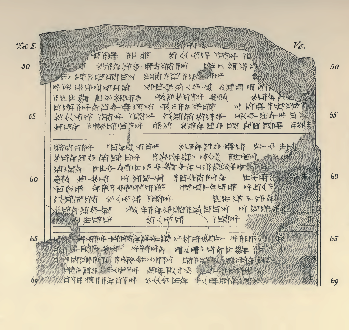 List Tuszratty do Amenhotepa III w języku huryckim – autografia.